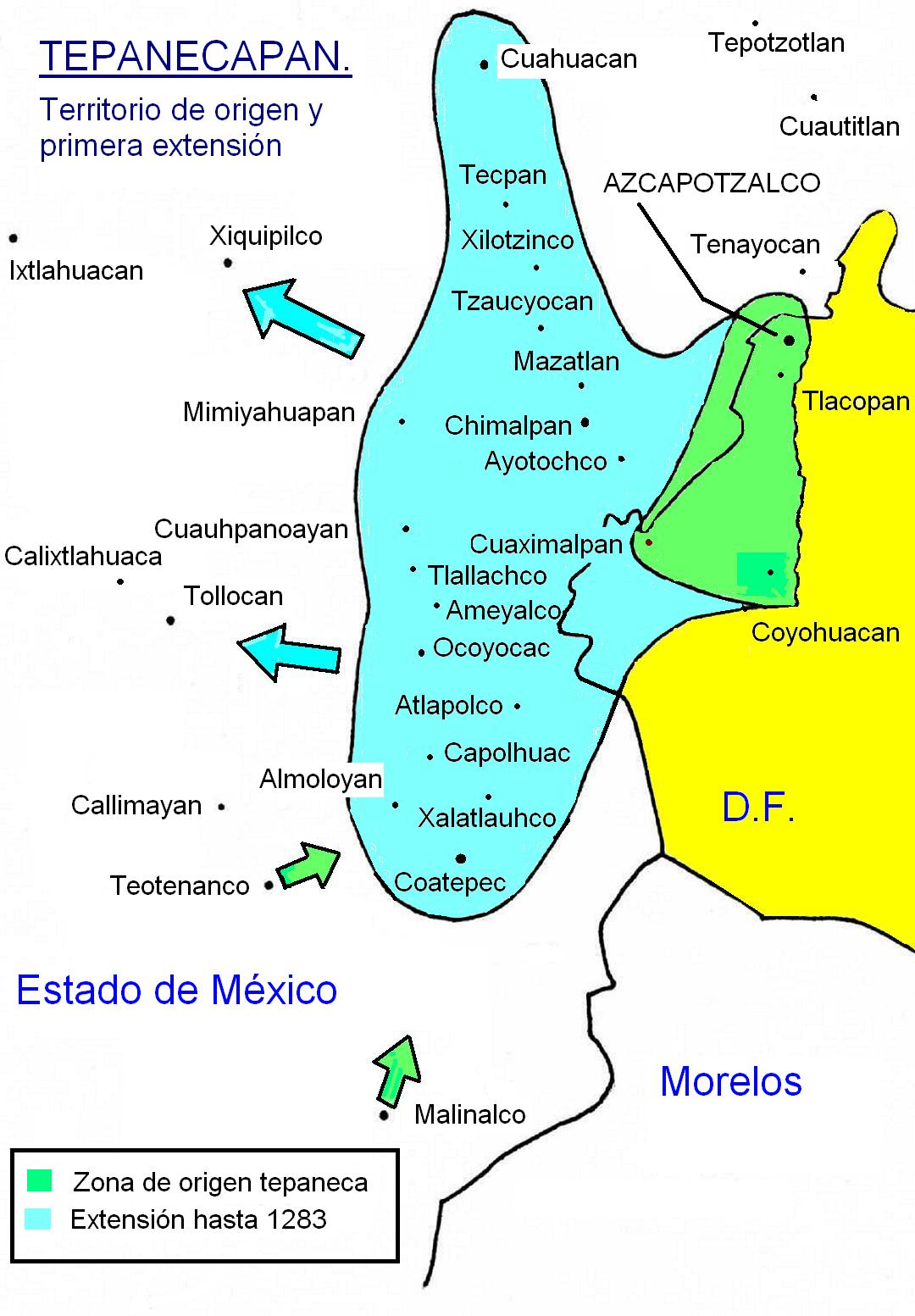 Mapa del territorio que se cree originalmente ocupó la etnia Tepaneca, de filiación otopame. Que se desarrolló del 600 a 1222 d.n.E., y su posterior extensión hasta la muerte de Tezcapoctzin en 1283.